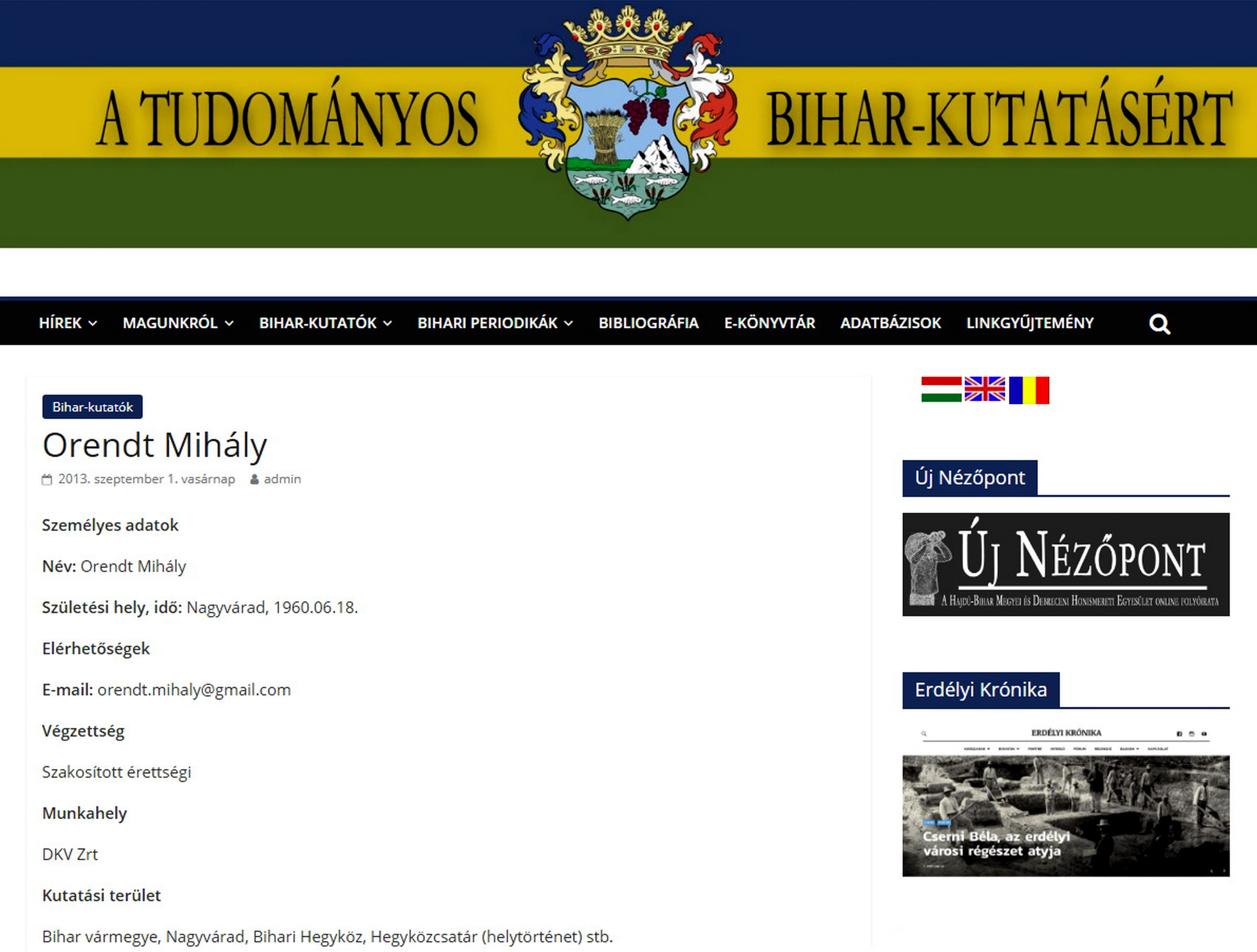 Helytörténeti kutatások